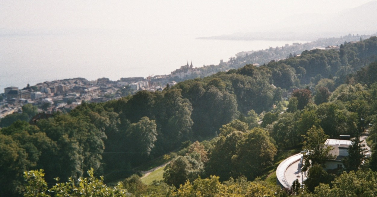 Blick über das Centre Dürrenmatt auf Neuchâtel und den Neuenburger See